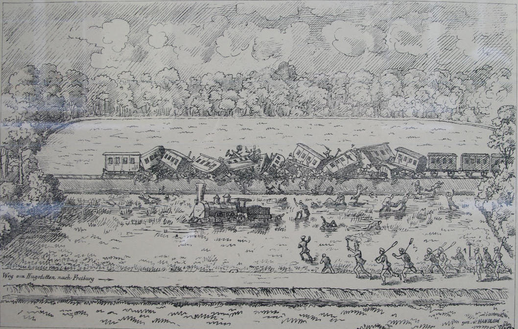 Dokumente zum Zugunglück in Hugstetten am 3. September 1882